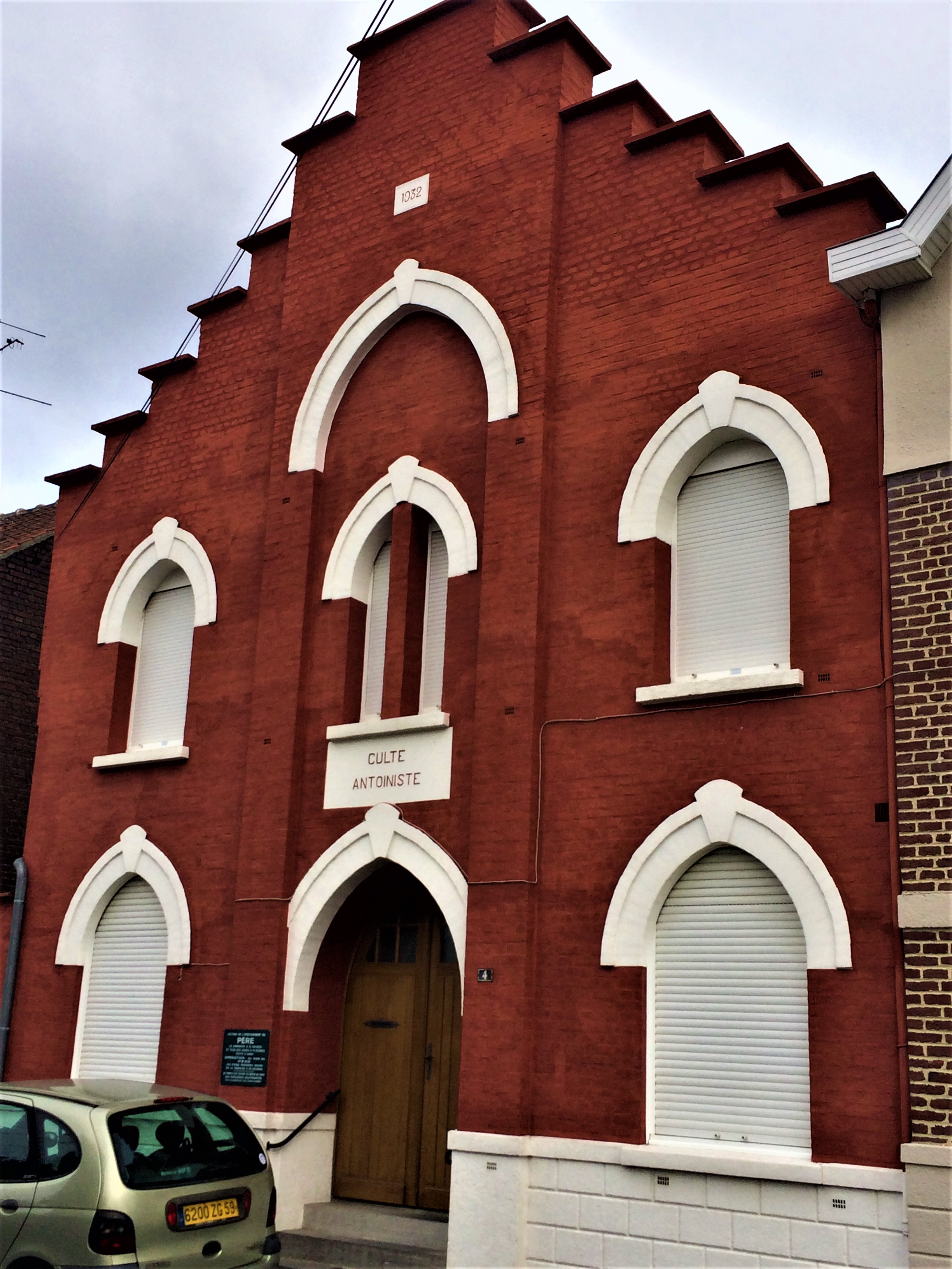 Temple antoiniste de Valenciennes (Nord), situé au 4 rue de Madagascar